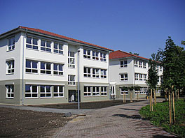 Das Philipp-Melanchthon-Gymnasium in Grünheide (Mark) Frontansicht.